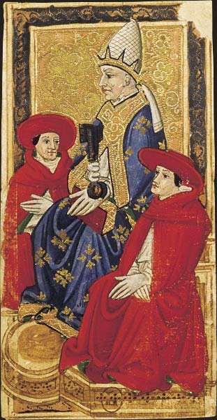 Charles VI (or Gringonneur) Deck; Le tarot dit de Charles VI